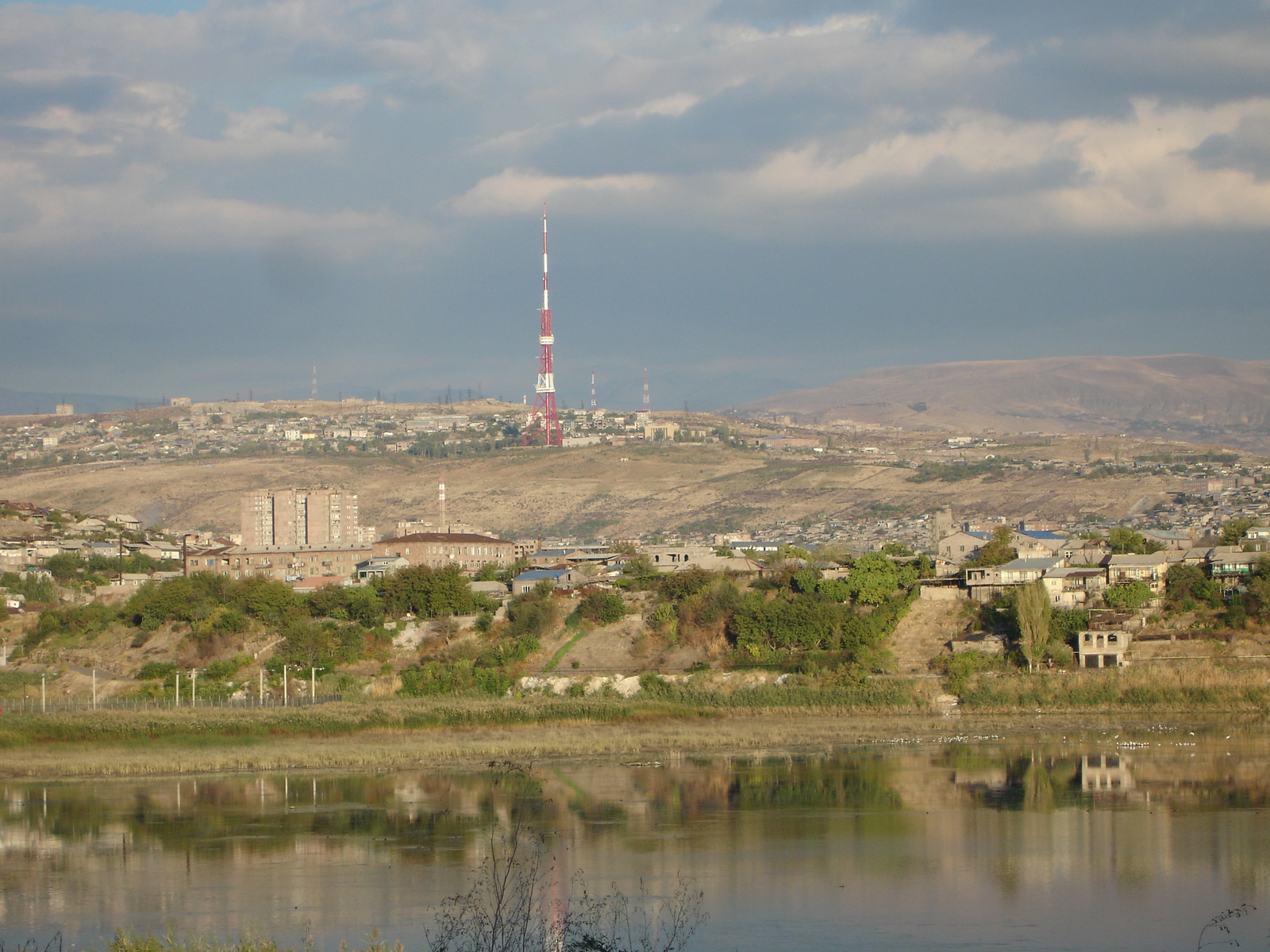 Lac Yerevanian + tour télévision